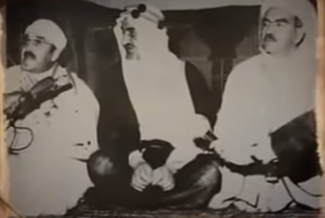 صورة نادرة اثناء زيارة الملك فيصل بن عبد العزيز ال سعود الى جامع الزيتونة يتوسط الامام الاكبر الشريف سيدي مصطفى محسن و الشيخ العلامة محمد الفاضل بن عاشور والصورة مقتطفة بمحراب جامع الزيتونة